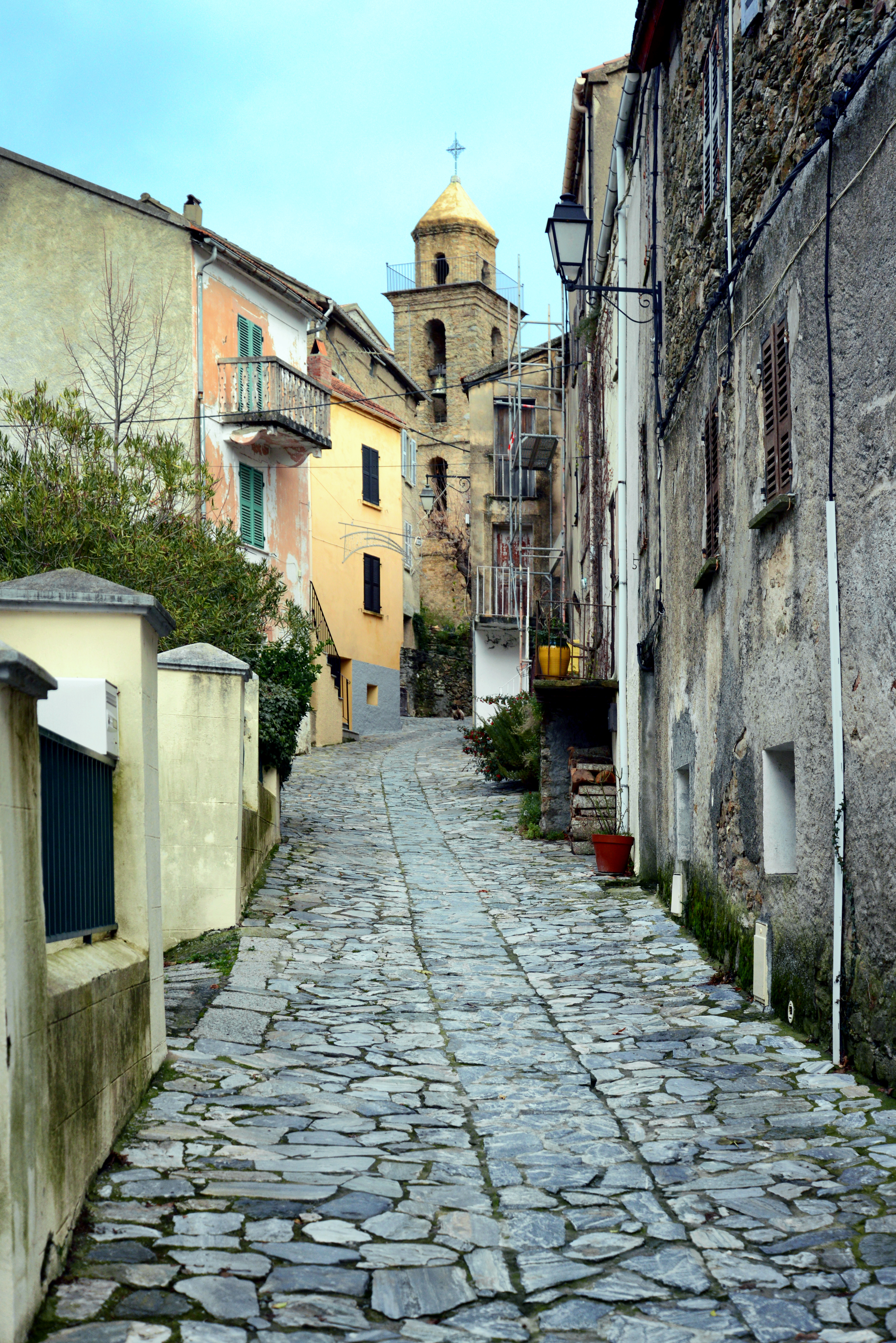 Riventosa, Centre Corse - Rue principale du village. Au fond, le clocher de l'église Sant' Antone Abbate